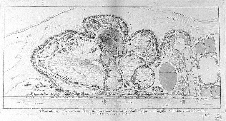 Plan de la presqu'île de Perrache avec le projet du palais impérial et du tombeau, dessiné par Curten aîné en1807. Échelle1/2600e